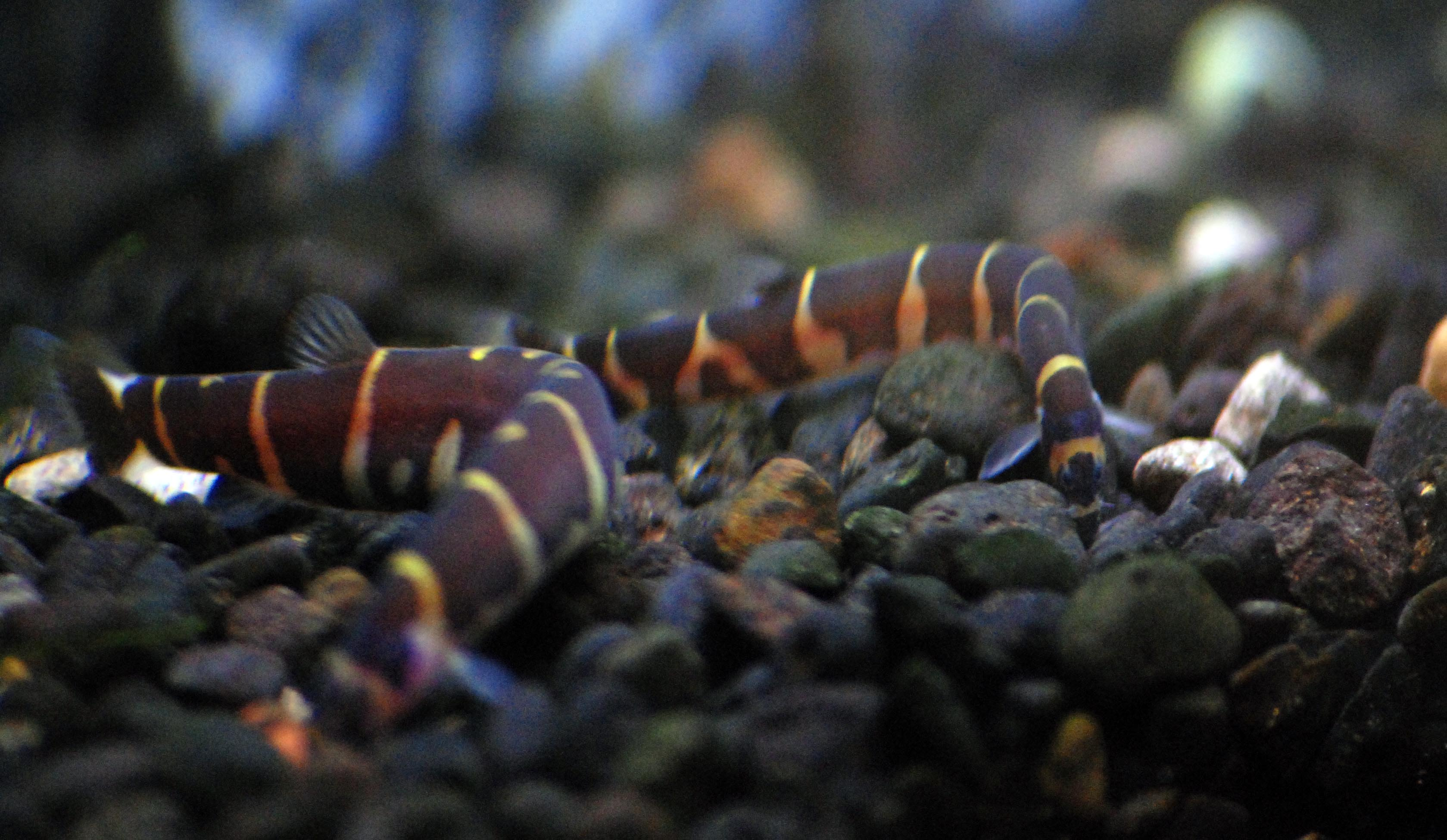 Kuhli Loaches, Pangio sp.